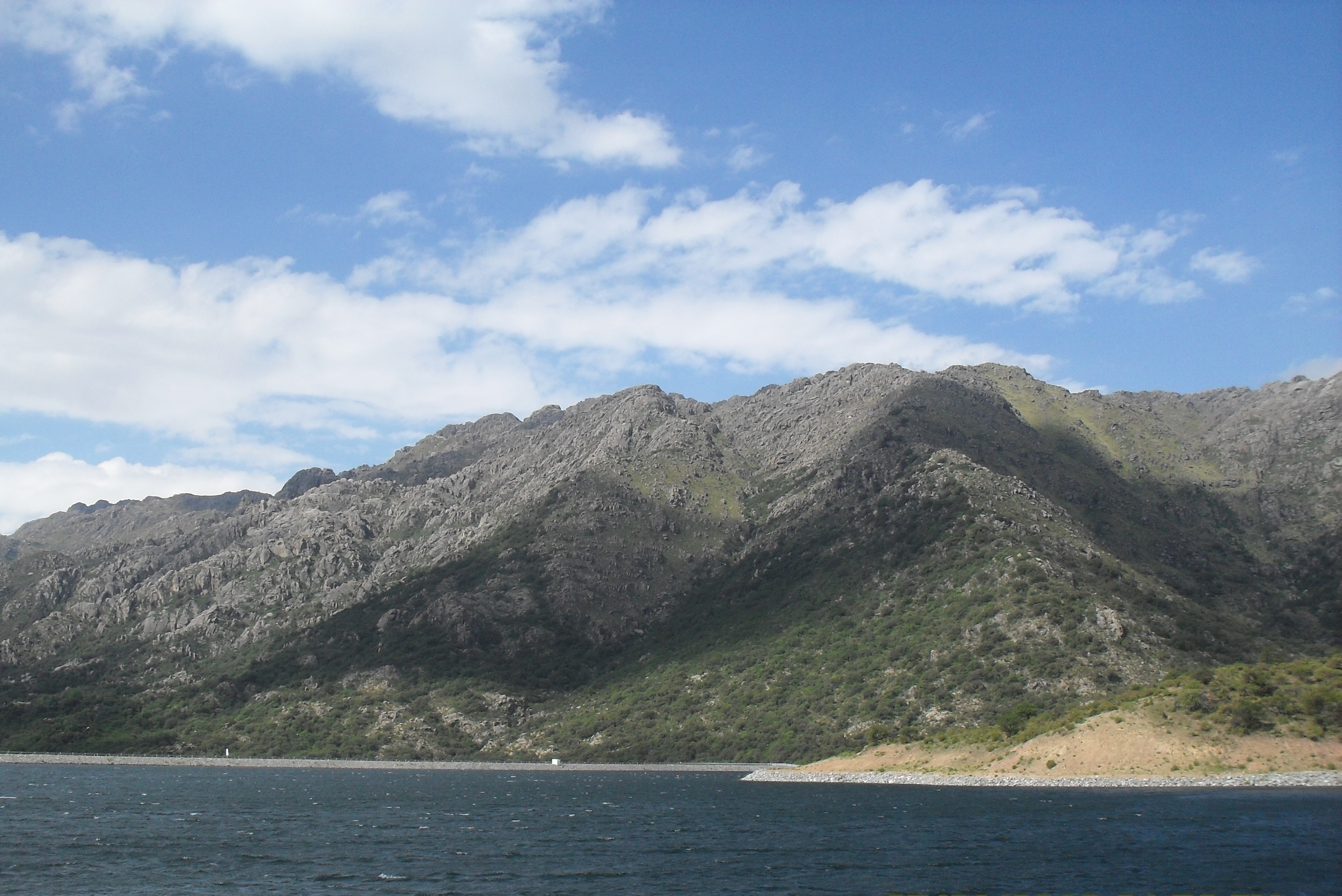 Sierra de Comechingones desde un embalse en la prov. de San Luis, Argentina.